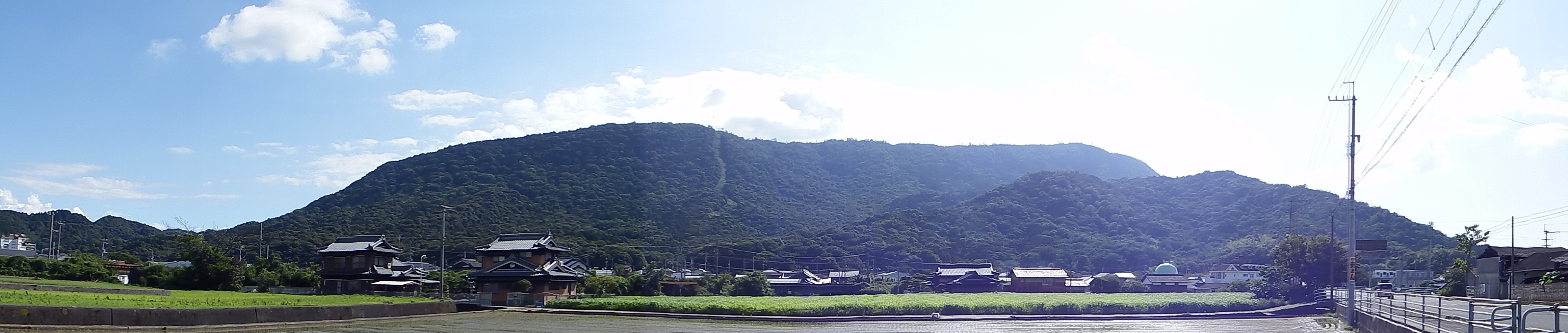 琴平山の全景